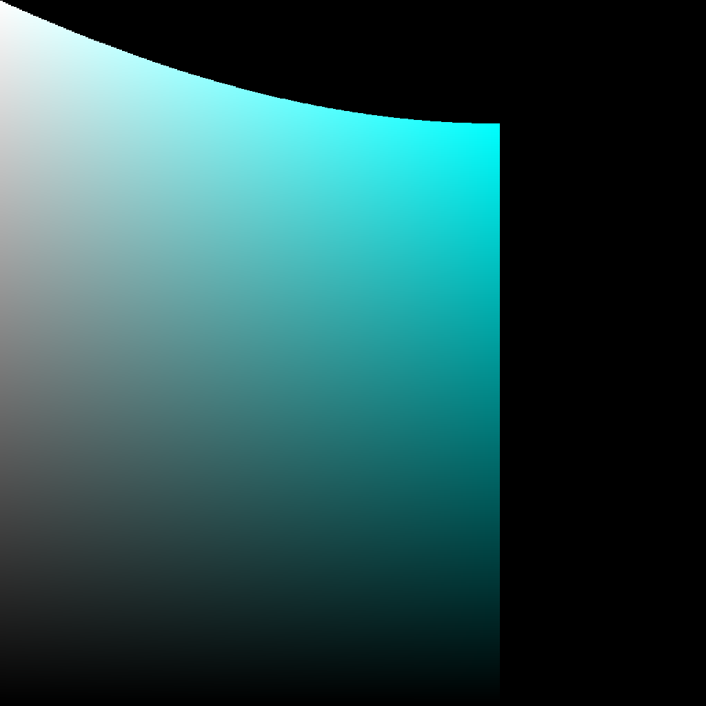 Doorsnede uit een kleurenruimte voor RGB-monitors. Op de assen: intensiteit (vertikaal) en verzadiging (horizontaal). Tint: 180 graden (van 360).